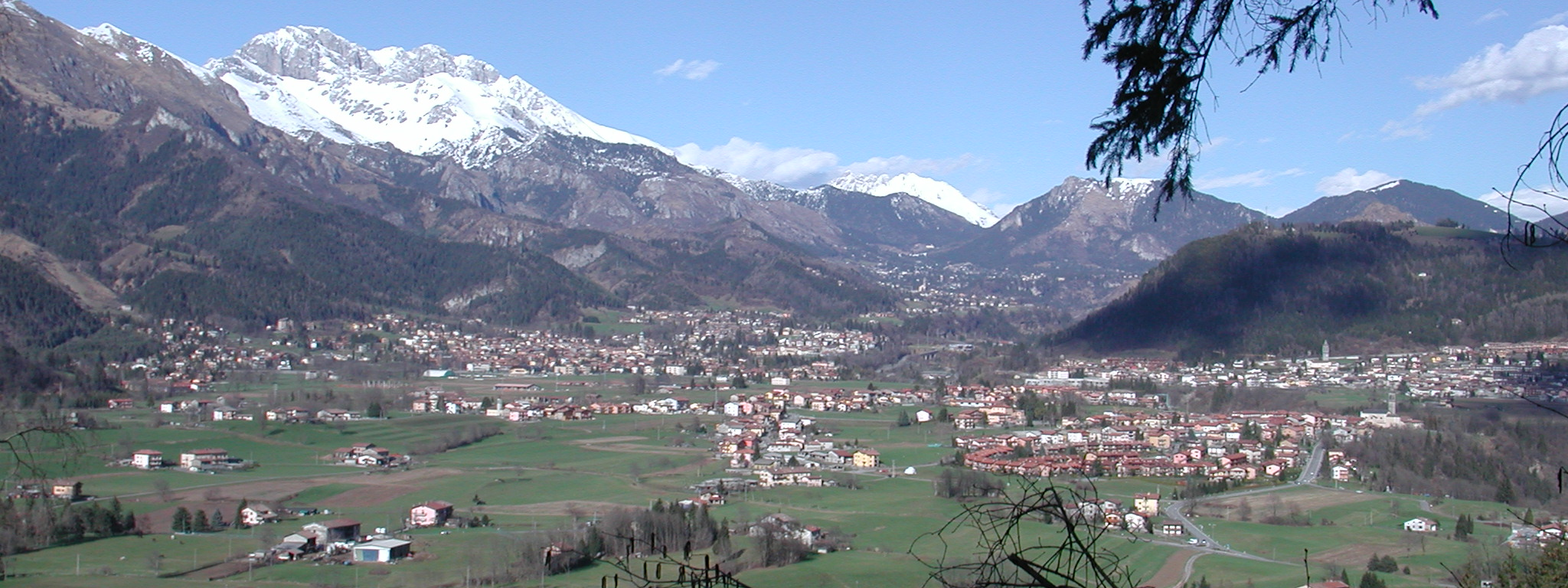 Clusone, Val Seriana, Italy